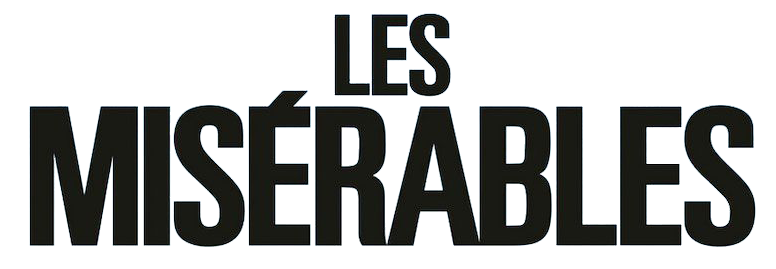 Logo du film de Ladj Ly de 2019 Les Misérables.